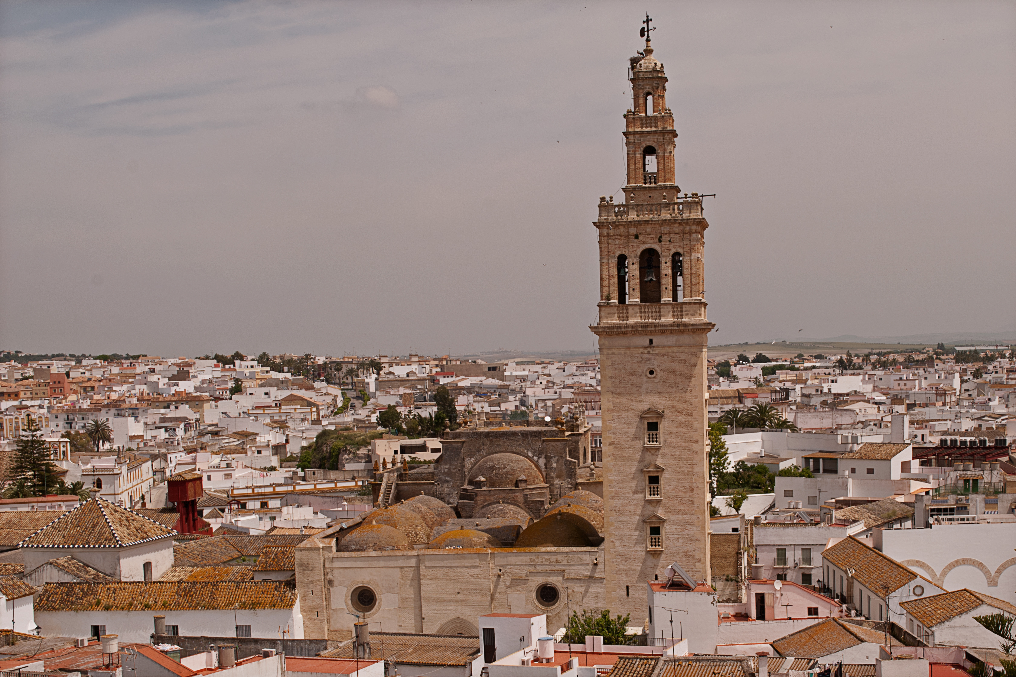 Vista general de Lebrija, en el centro Iglesia Mayor de Santa María de la Oliva